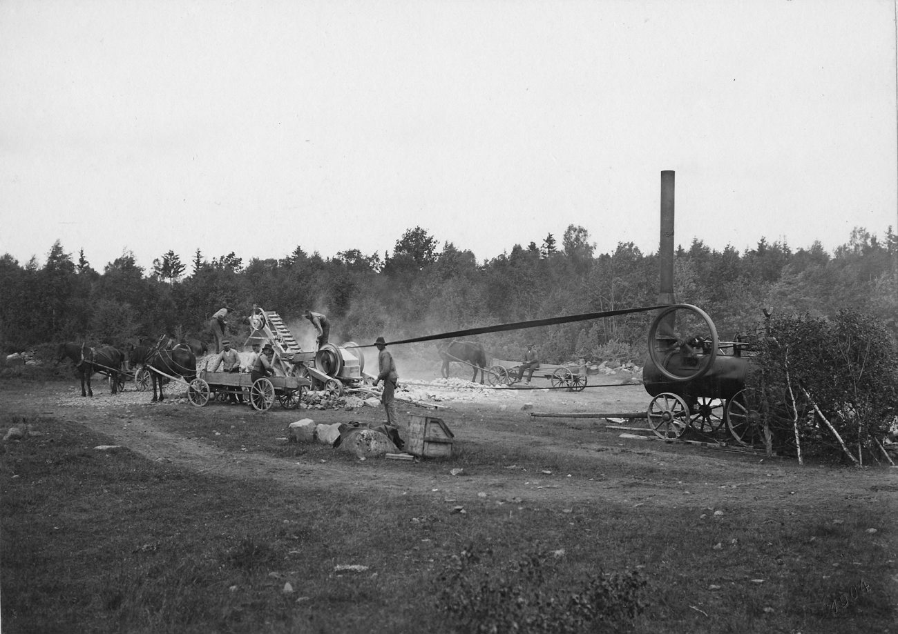 B10473. Stenkrossningsmaskin i verksamhet vid Lilla Getnabo i Torsås. Byvägen från Torsås kyrka förbi Slåtarfly byar till Ulfvasjömåla i Blekinge håller på att förändras till landsväg och för detta arbetet hade en stenkross köpts in. Med fotografiet erhöll fotografen Svenska Turistföreningens fotostipendium 1904. Fotografiet är skänkt till Tekniska museet från Svenska Turistföreningen.